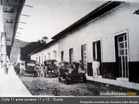 Calle 11.